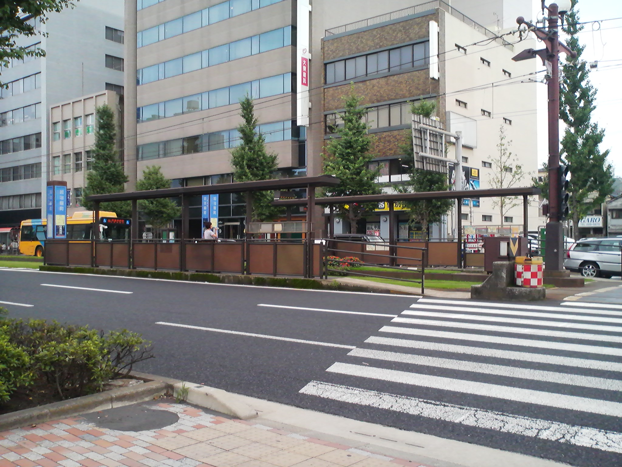 鹿児島市電加治屋町駅の外観